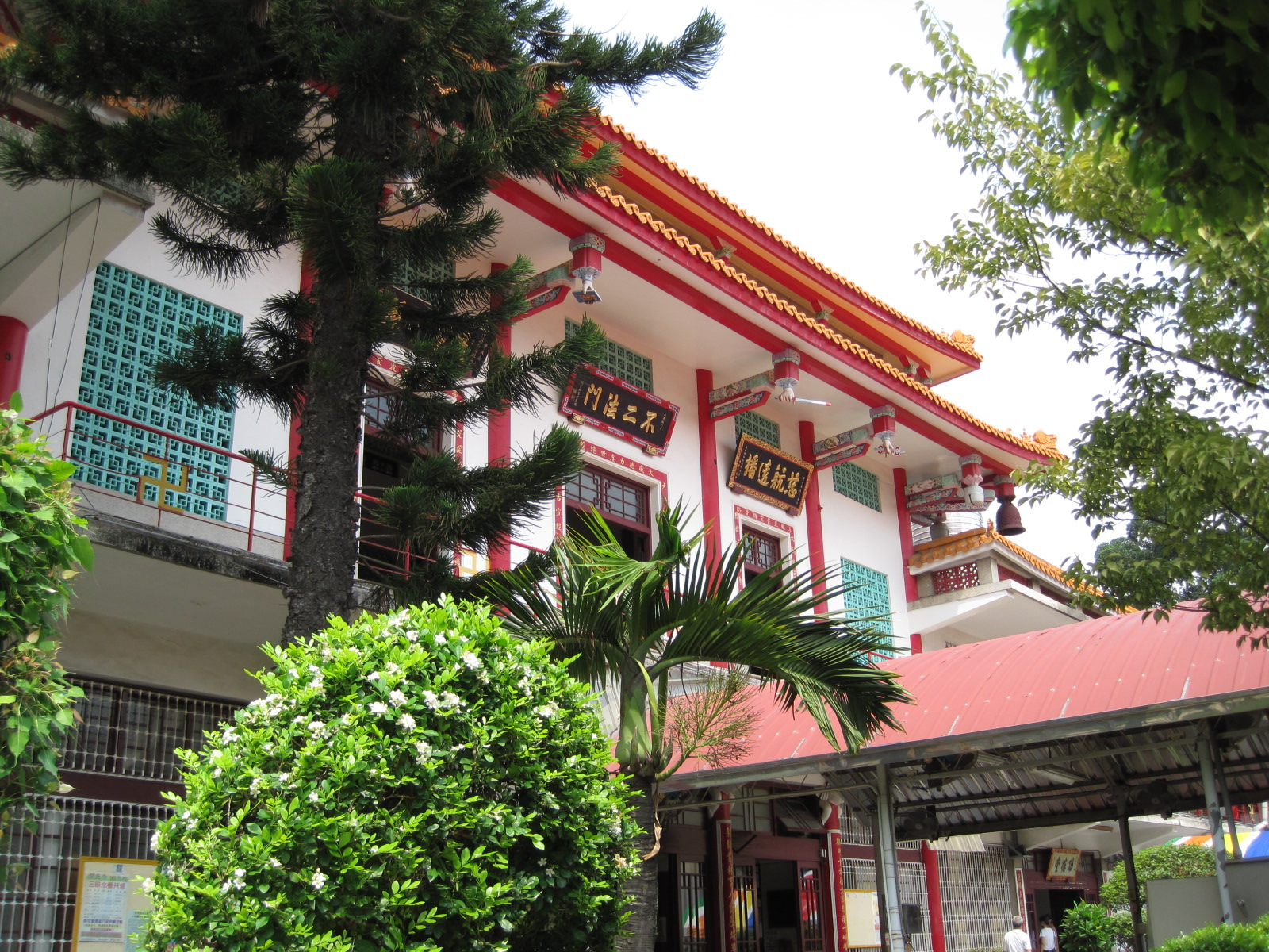 臺南開元寺大士殿